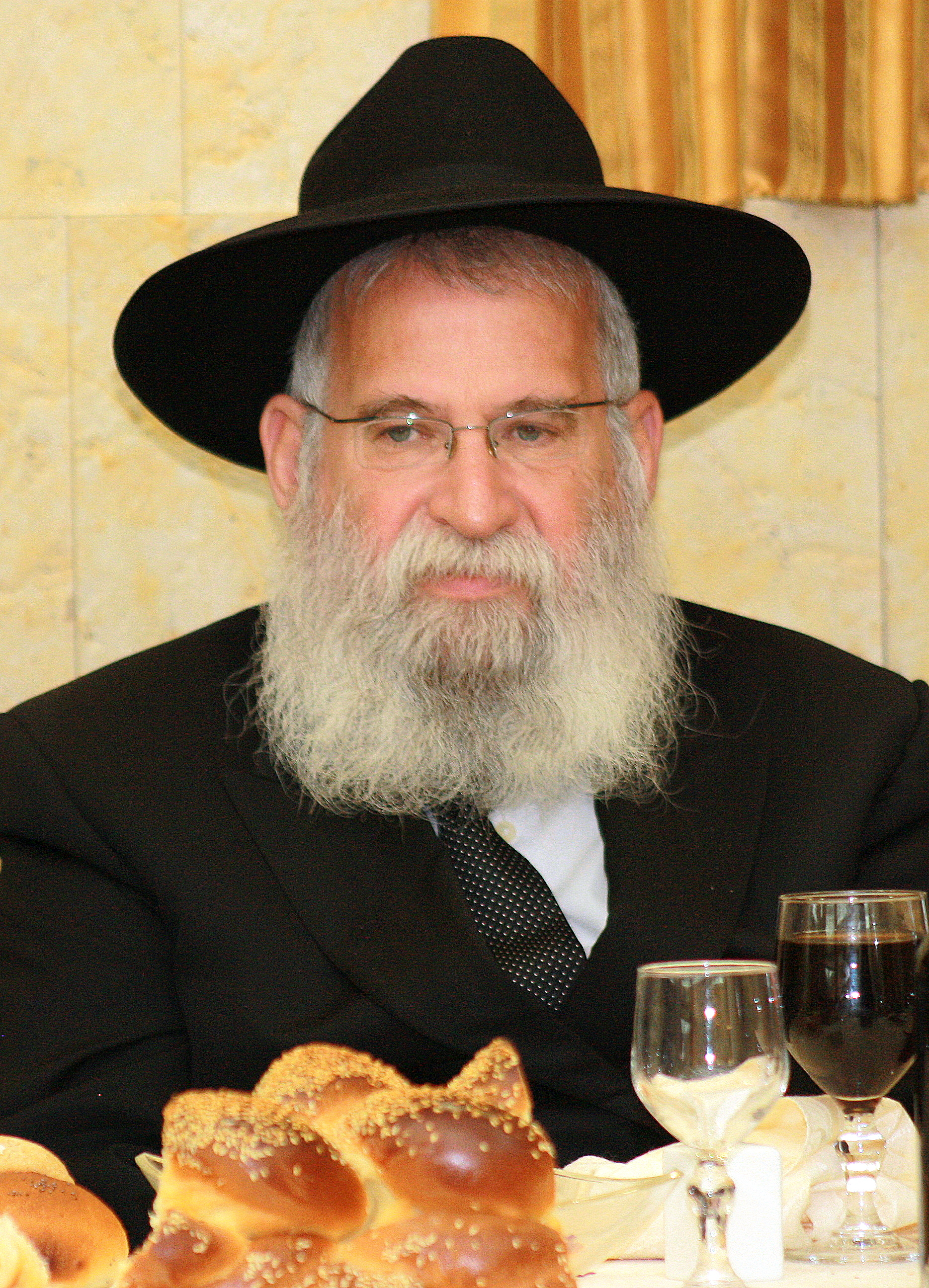 הרב אליהו יוחנן גוראריה הוא רבה הראשי האשכנזי של חולון.